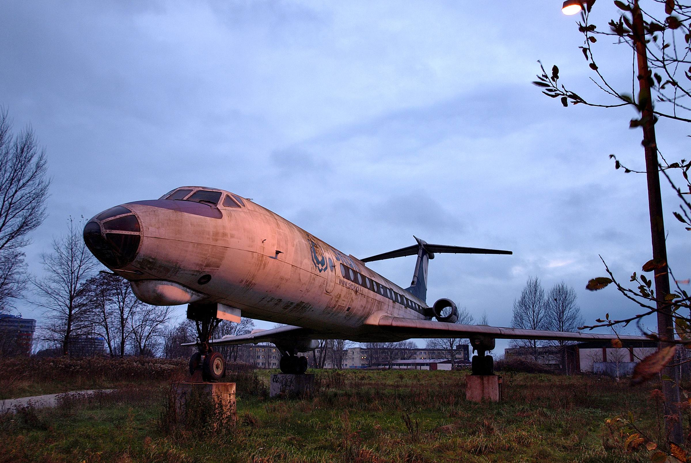 Zapomniany TU-134A w zaroślach